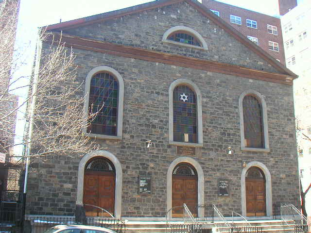 Synagogue Bialystoker